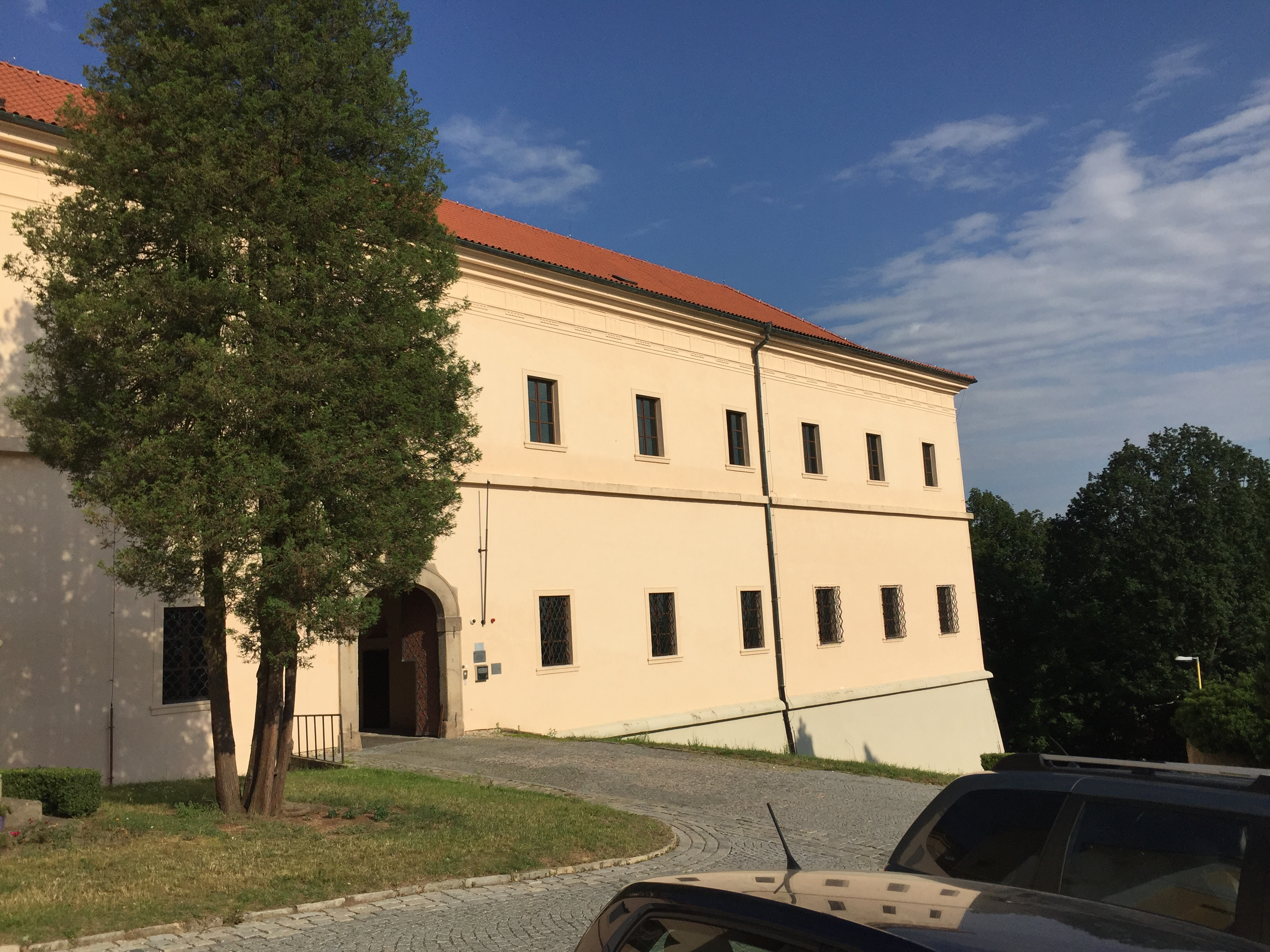 Proboštství(východní křídlo rezidence)